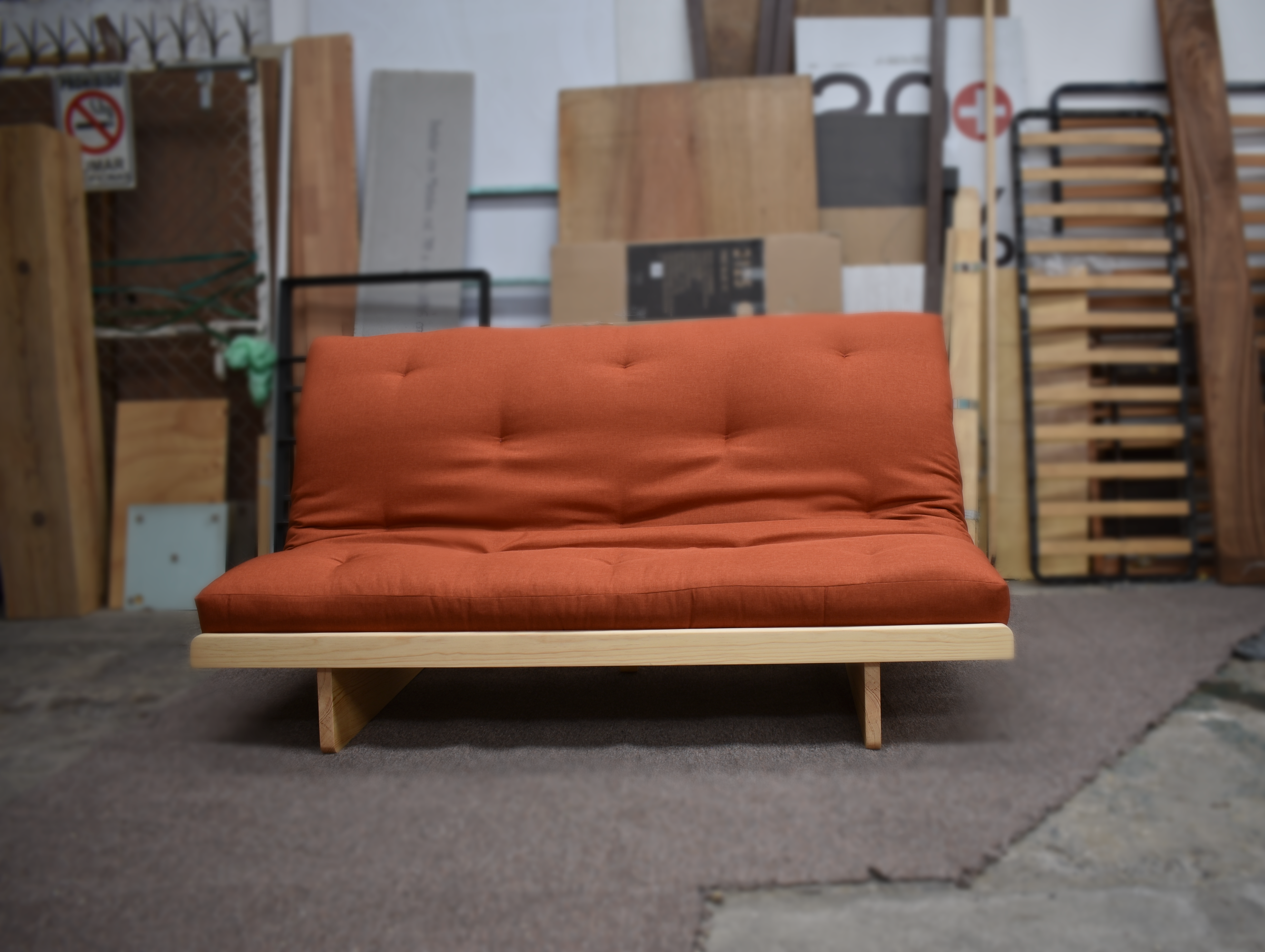 Futón matrimonial fabricado en México por Mobiliario Azzione